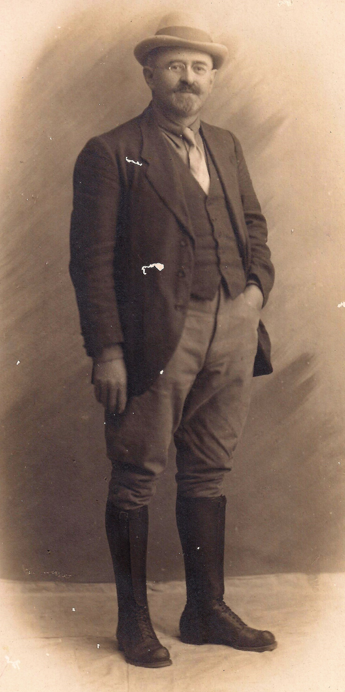 רפאל קוהן, פקיד הברון רוטשילד בזכרון יעקב, 1932-1892